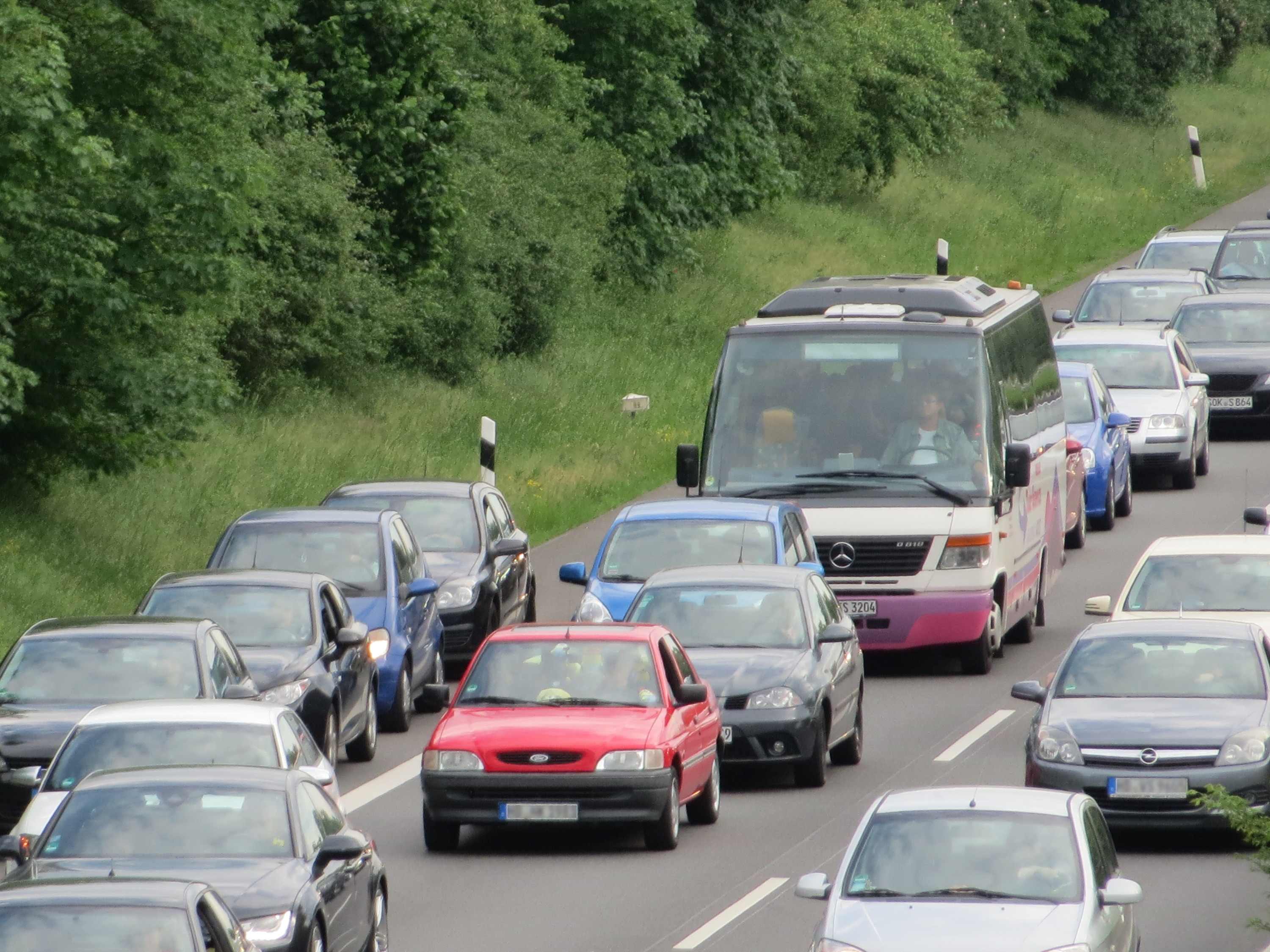 Stau auf der B36 vorm AC/DC-Konzert in Hockenheim 2015